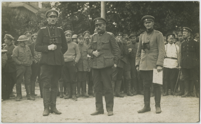 Eesti volinikud Karl Parts, Ernst Põdder ja Nikolai Reek läbirääkimistel Landesveeriga Rodenpoisis